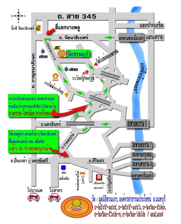 แผนที่วัดสวนแก้ว1